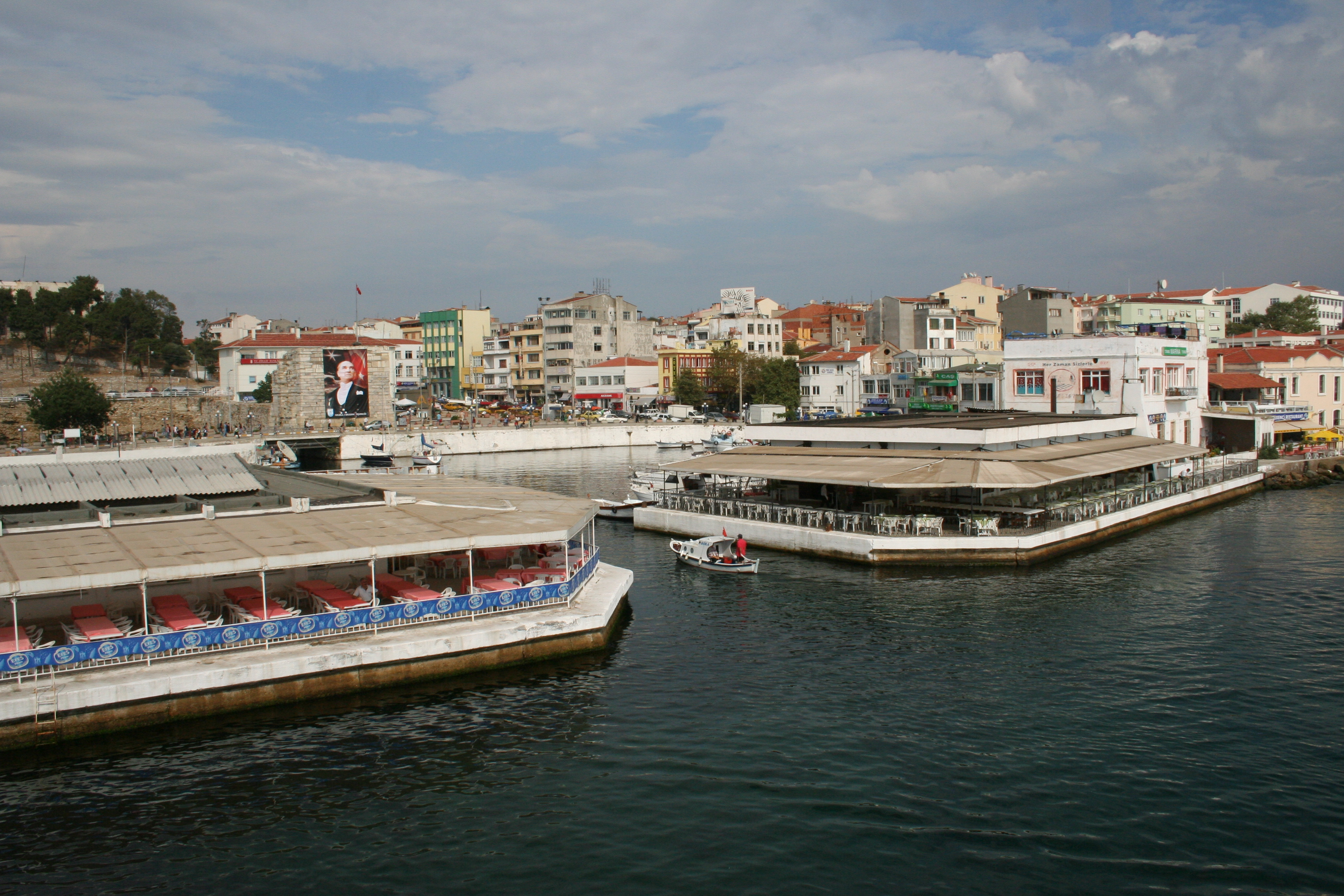 Gelibolu, Turkey.